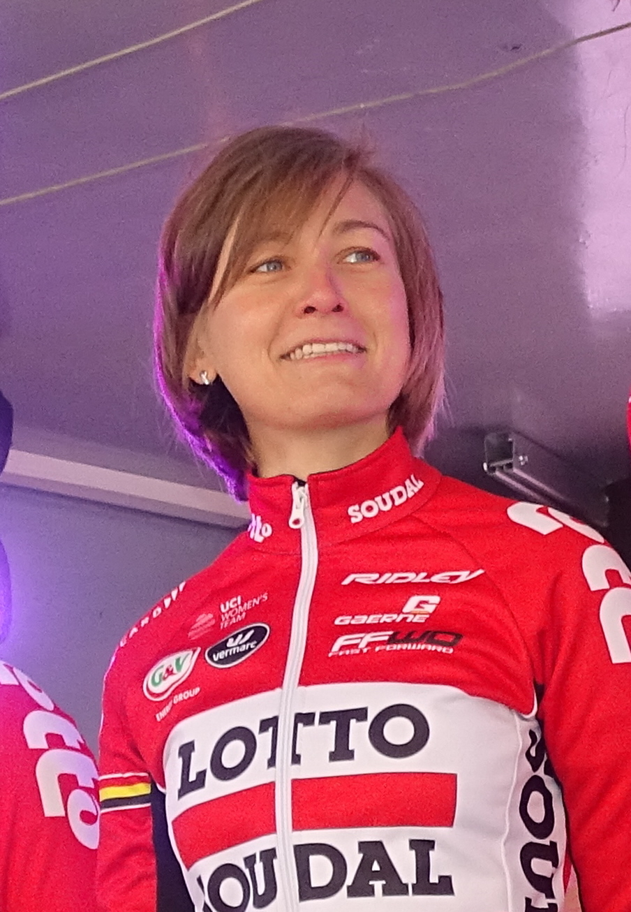 Sofie De Vuyst: ciclista belga